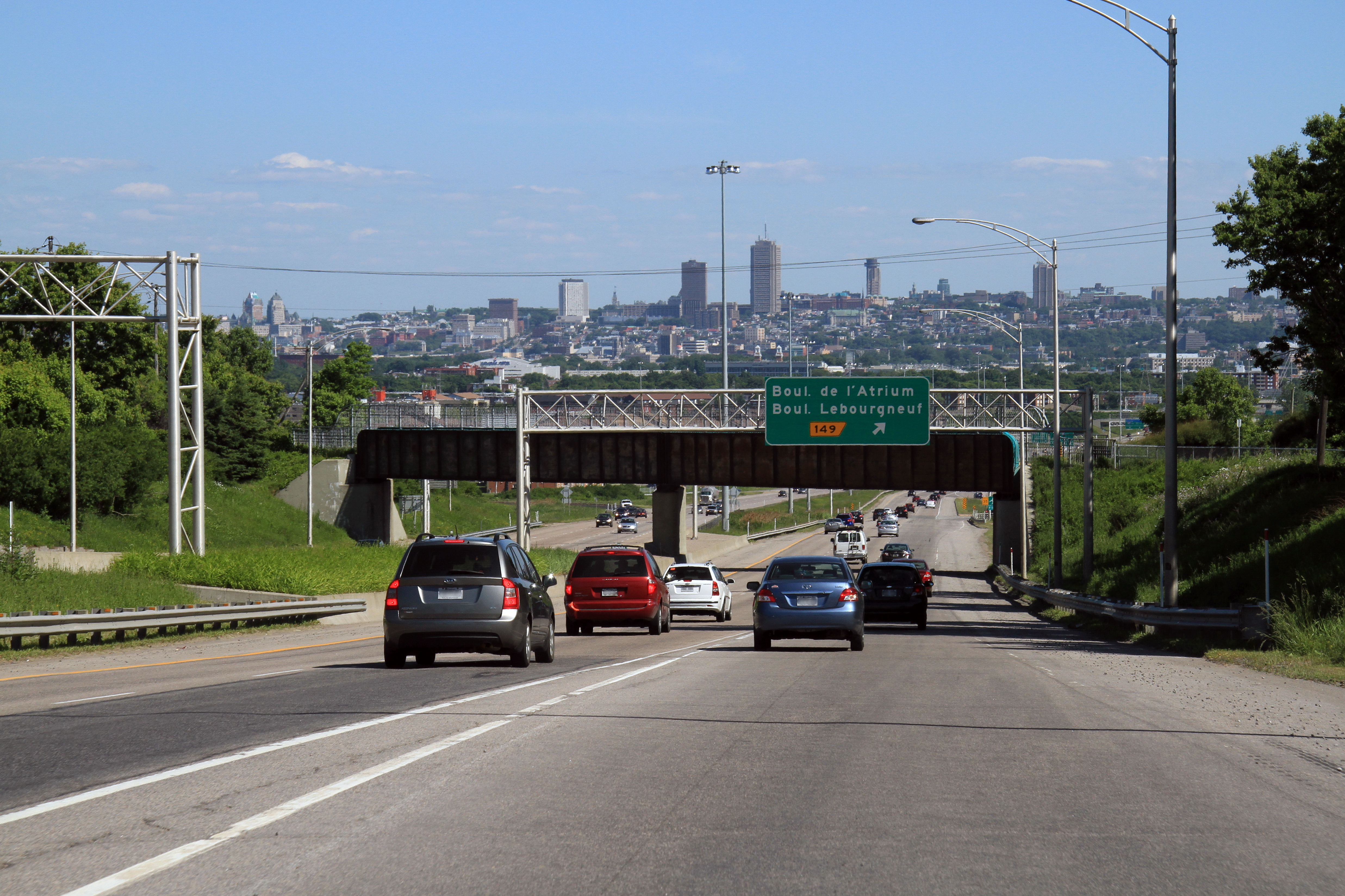 Autoroute Laurentienne (A73) en direction Sud à la hauteur de la sortie du boulevard des Atriums.